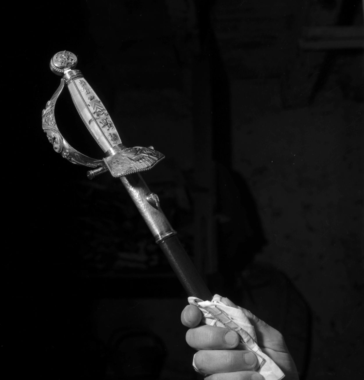 Halle au marché, place du Maréchal-Leclerc à Mirepoix (Ariège). 1953. Vue de l'épée remise à Antoine de Lévis-Mirepoix avant sa réception à l'Académie française.